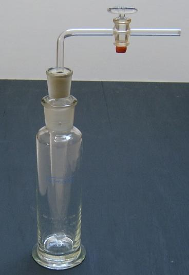 Gasentwicklungsflasche nach Albien